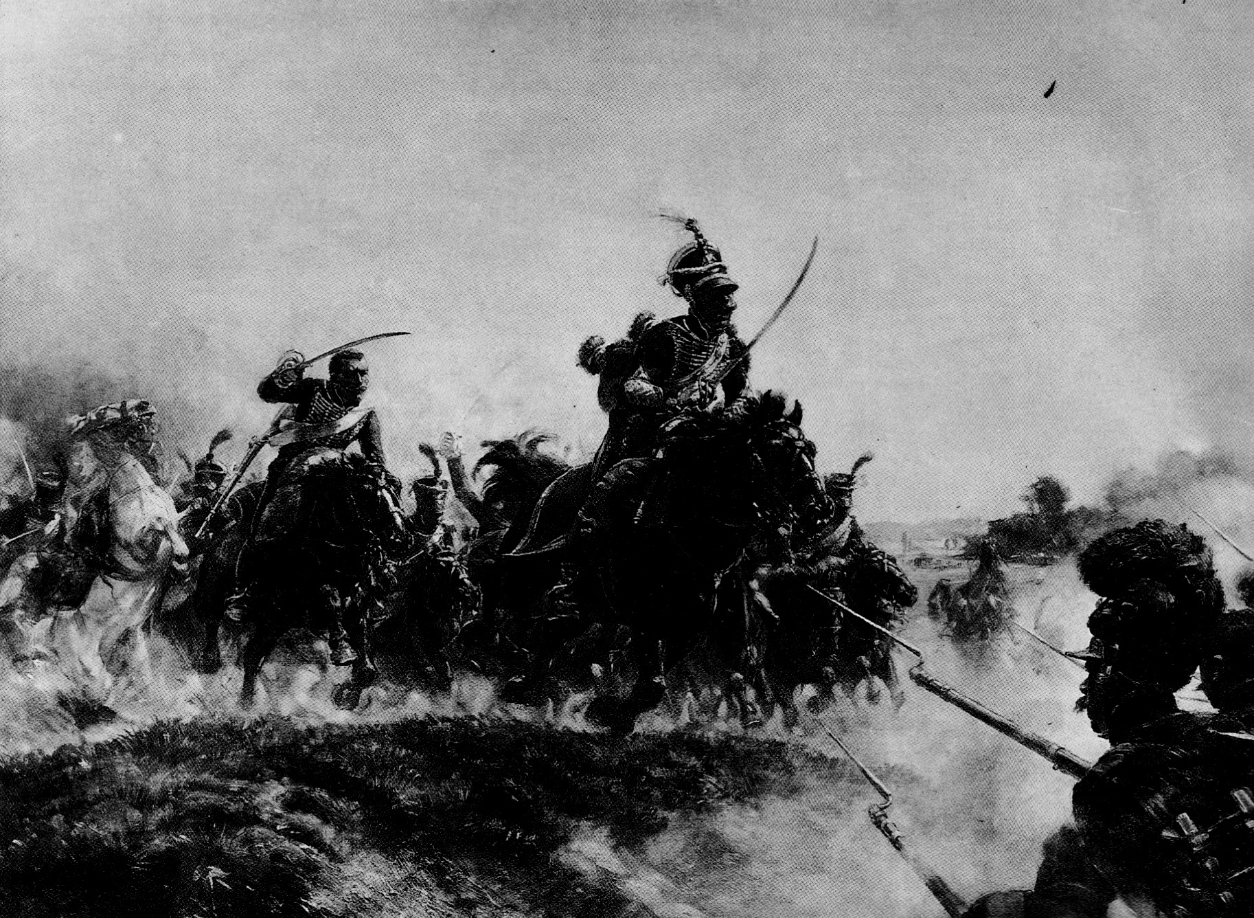 Les gardes d'honneur du 3e régiment à la bataille de Hanau (30 octobre 1813). Au cours de cet affrontement, la cavalerie de la Garde mène charge sur charge pour repousser les soldats bavarois du comte De Wrède.